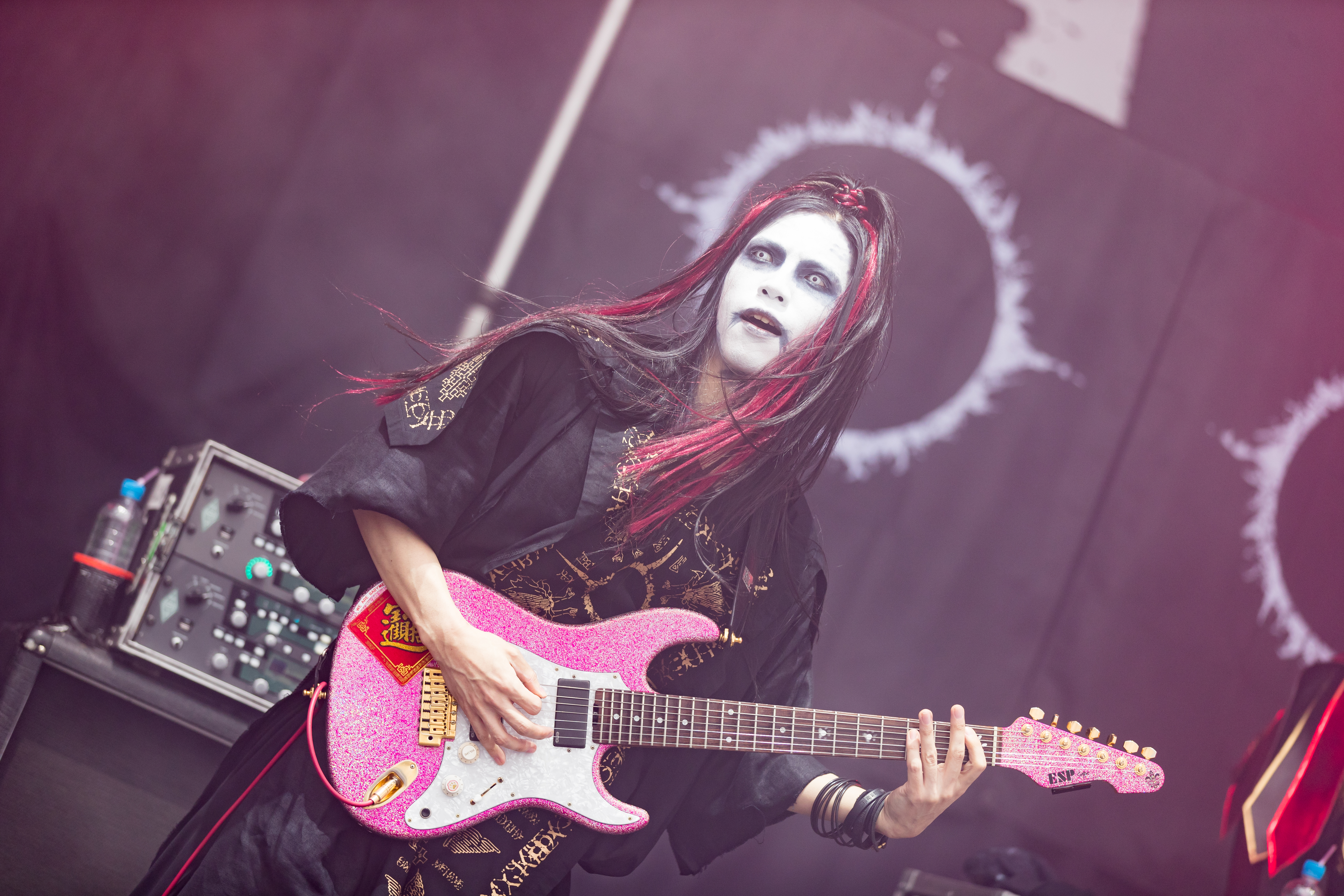 Babymetal @ Rock am Ring 2018